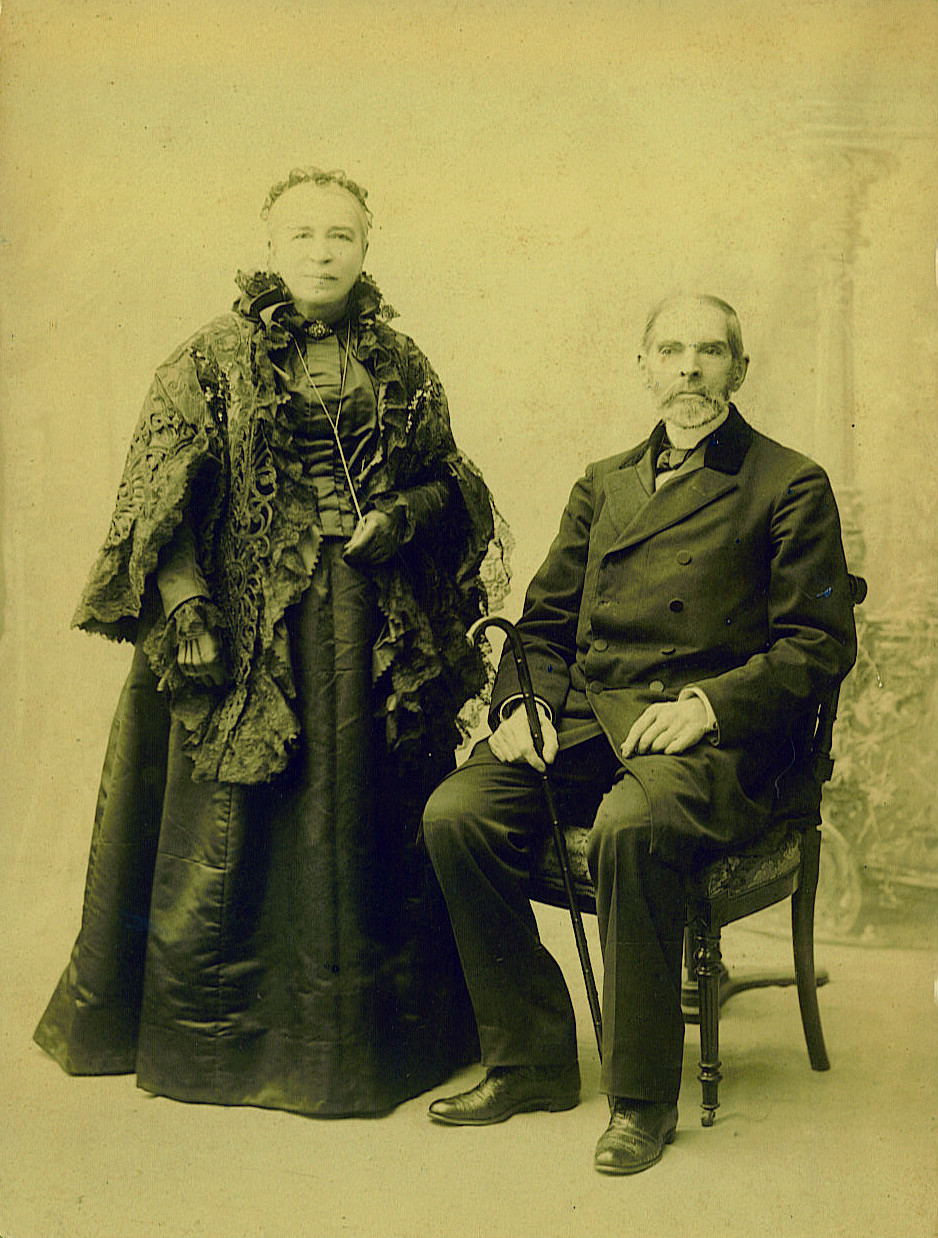 Carlos Risopatrón Escudero (Santiago, 3 de junio de 1824-ibíd., 4 de agosto de 1907) fue un abogado, juez y político chileno. En la foto junto a su esposa Leocadia Argomedo Lurquín